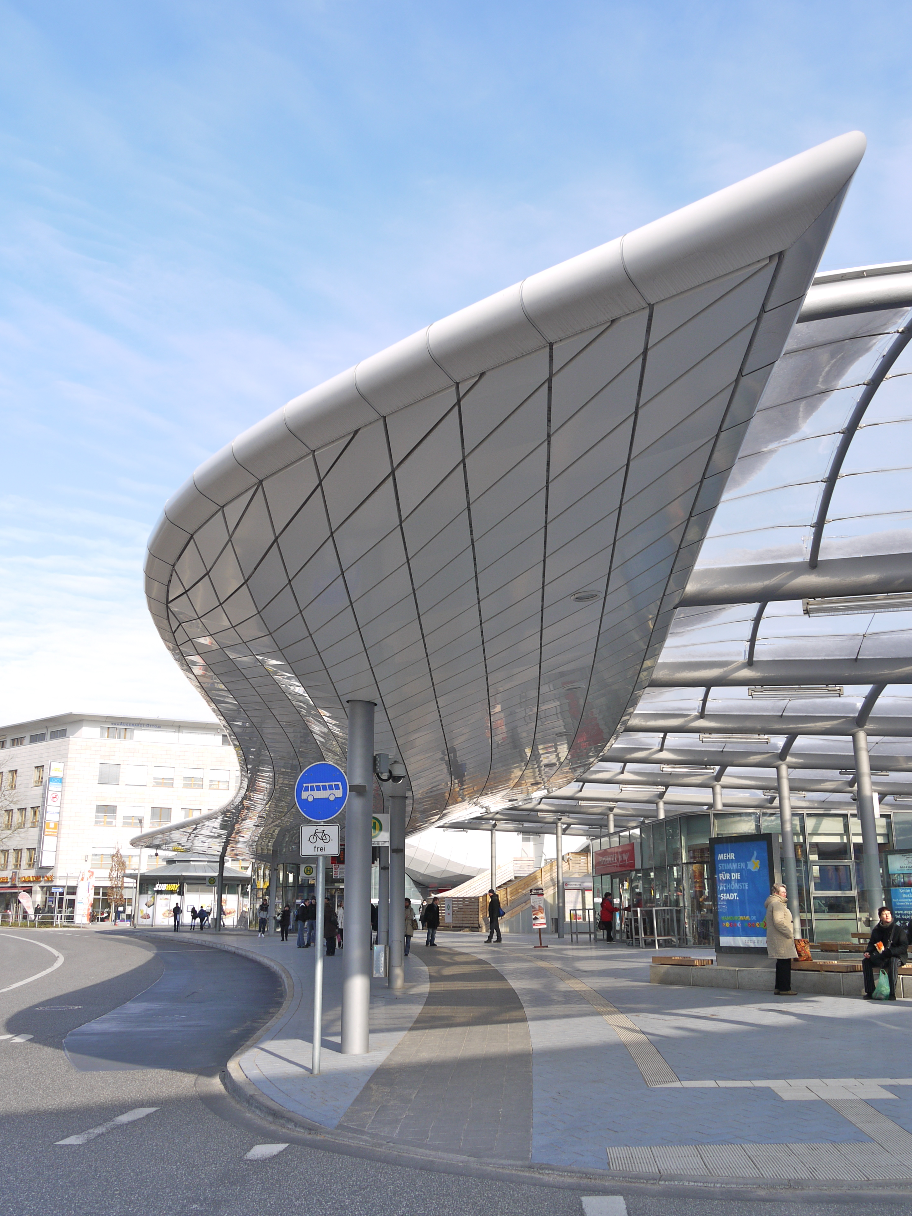 Busumsteigeanlage am S-Bahnhof Poppenbüttel in Hamburg.